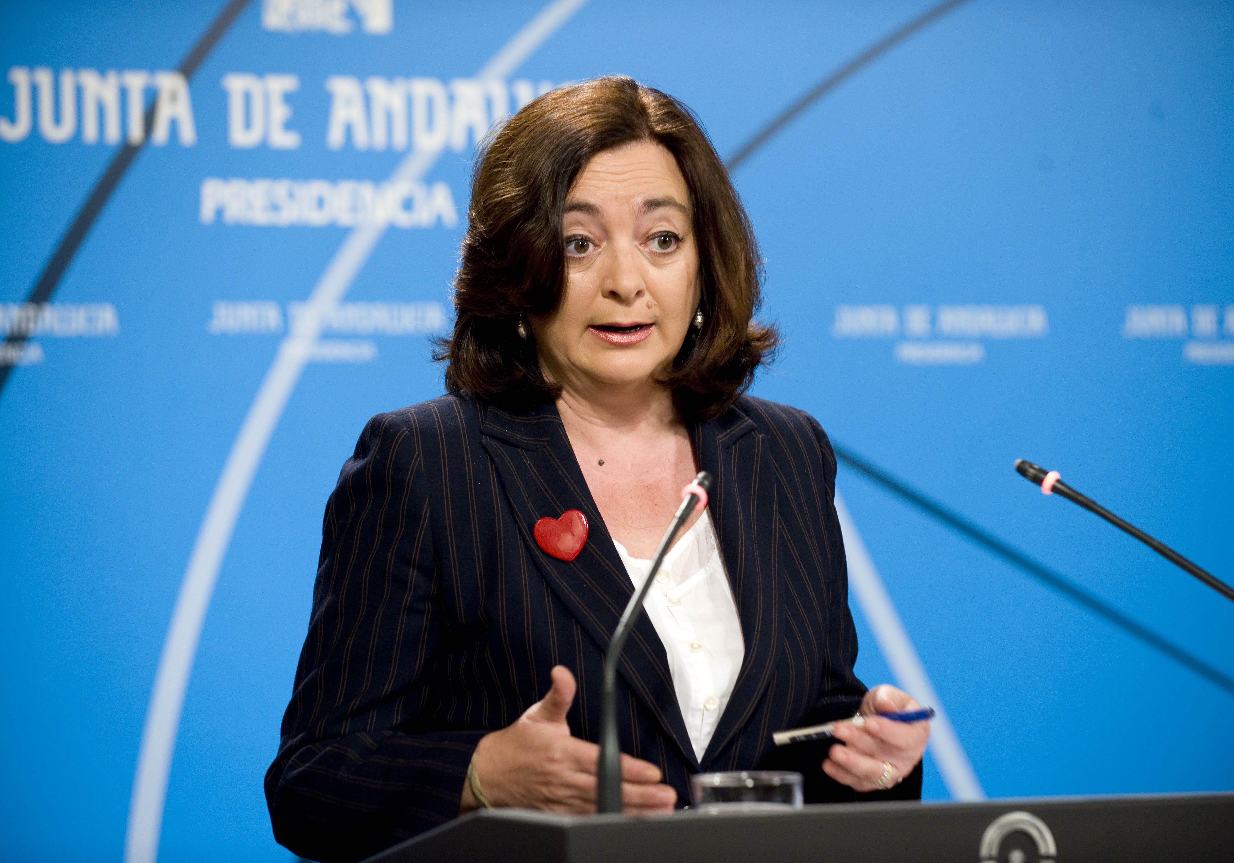 La consejera de Educación de la Junta de Andalucía